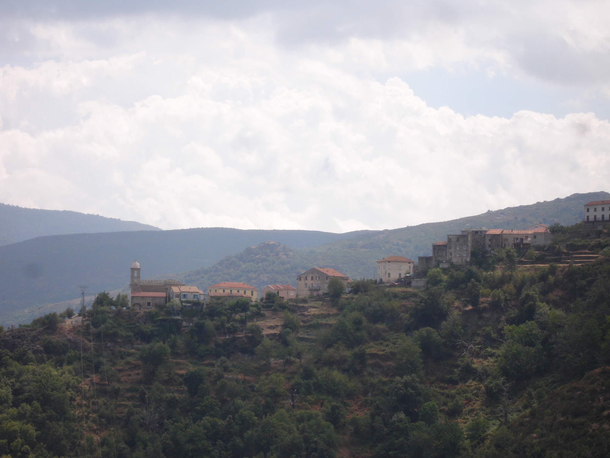 France, Haute-Corse (2B), San-Gavino-di-Tenda